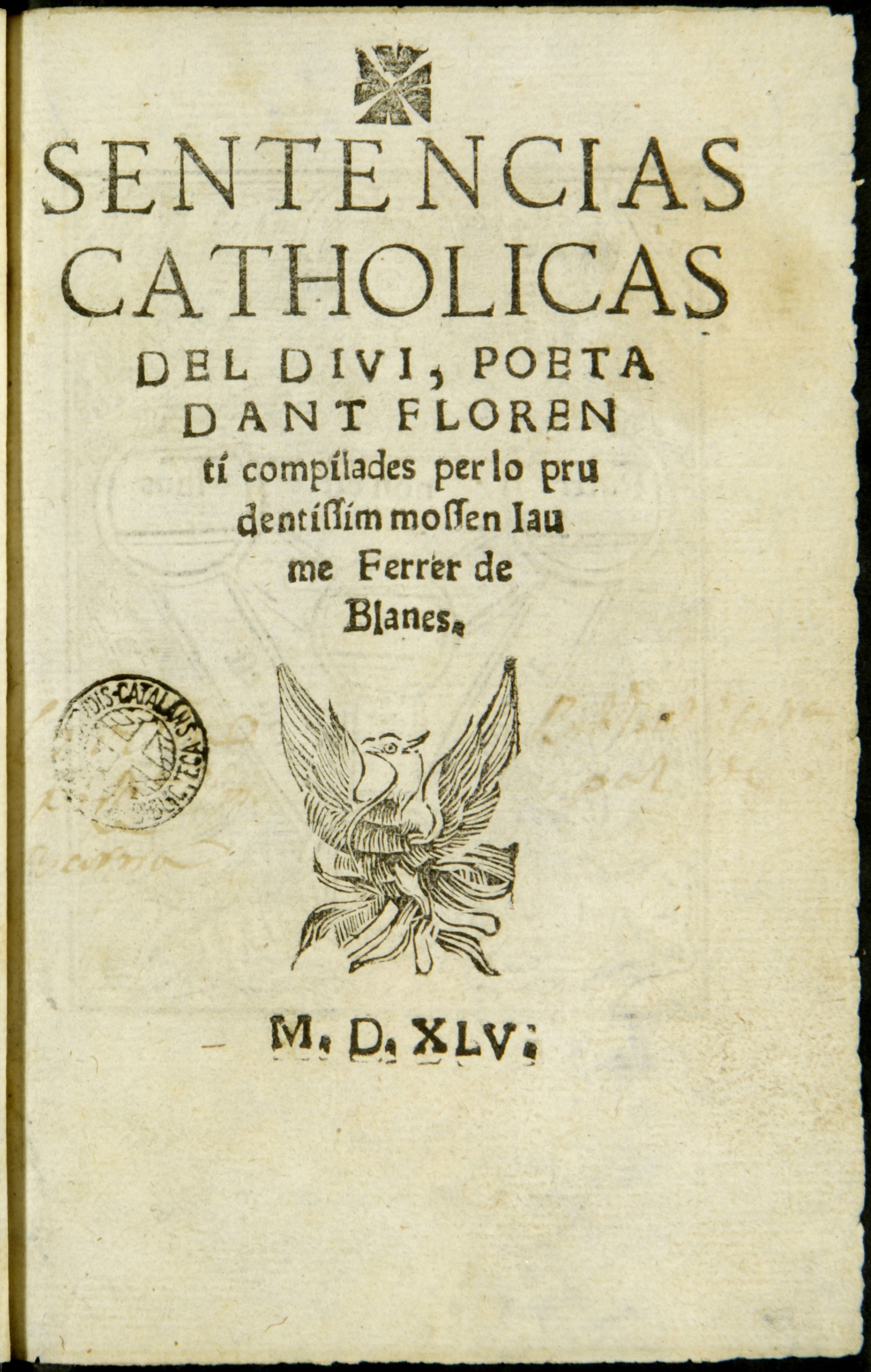 Portada del libro Sentencias Catholicas del divi, poeta Dant florenti" publicado en Barcelona en 1545.